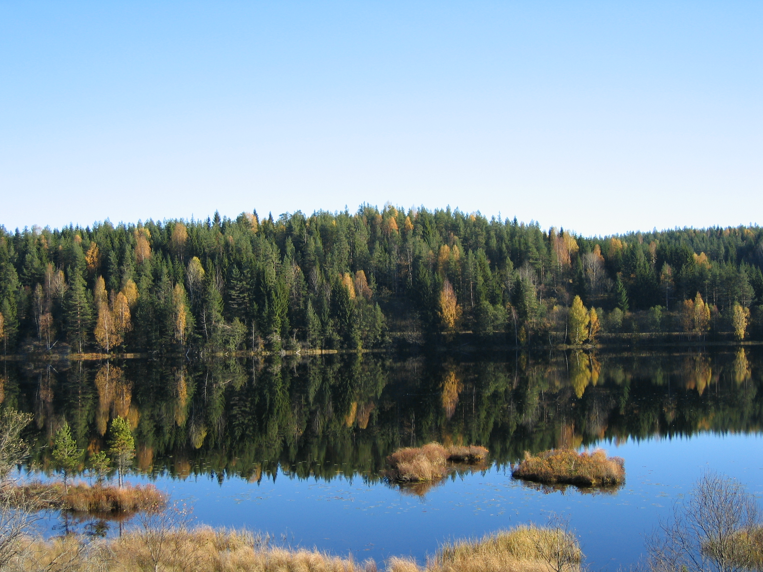 Vinlandstjern fra Vestsiden